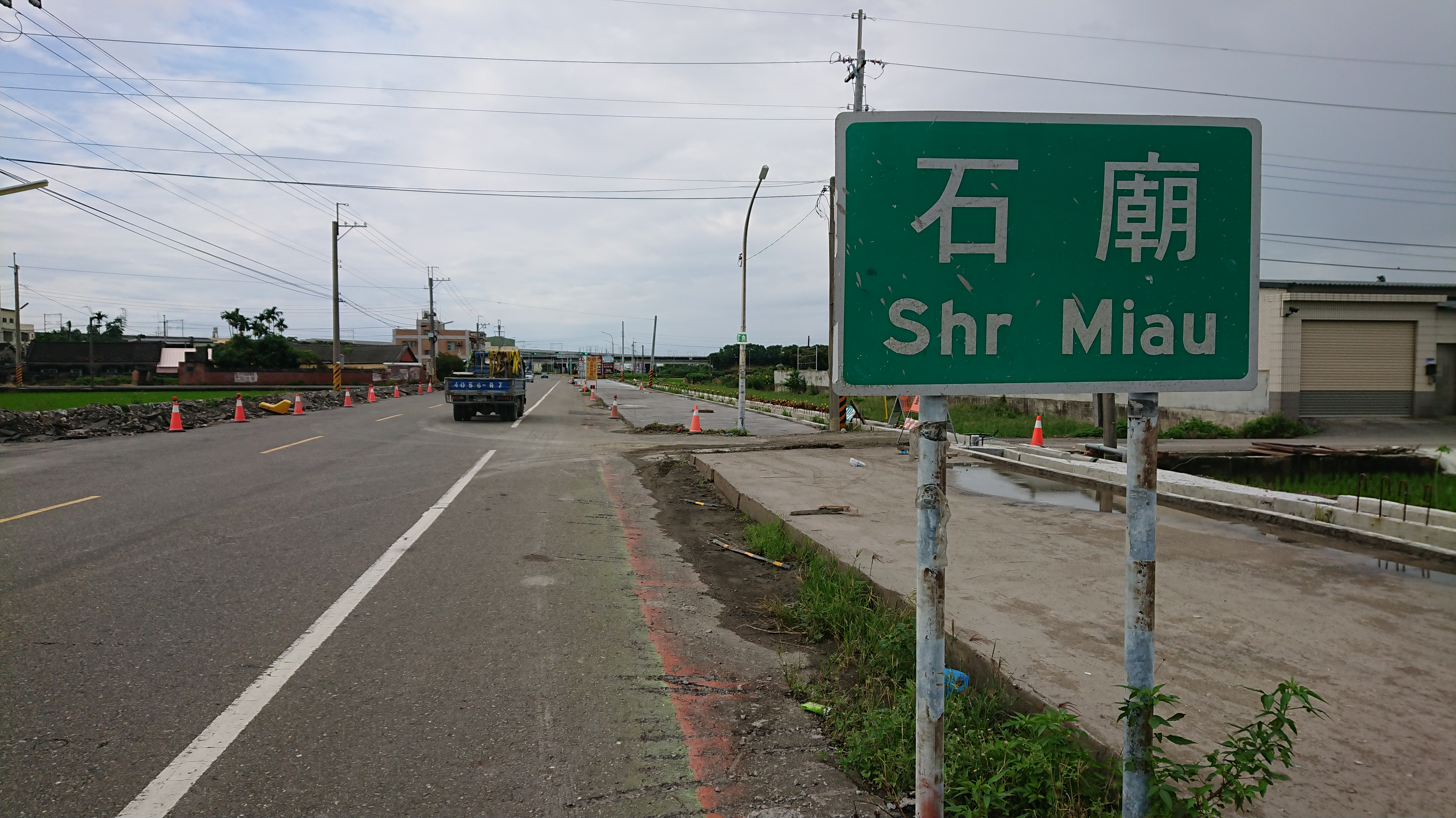 中文（台灣）: 因雲97線拓寬而消失的石廟地名牌